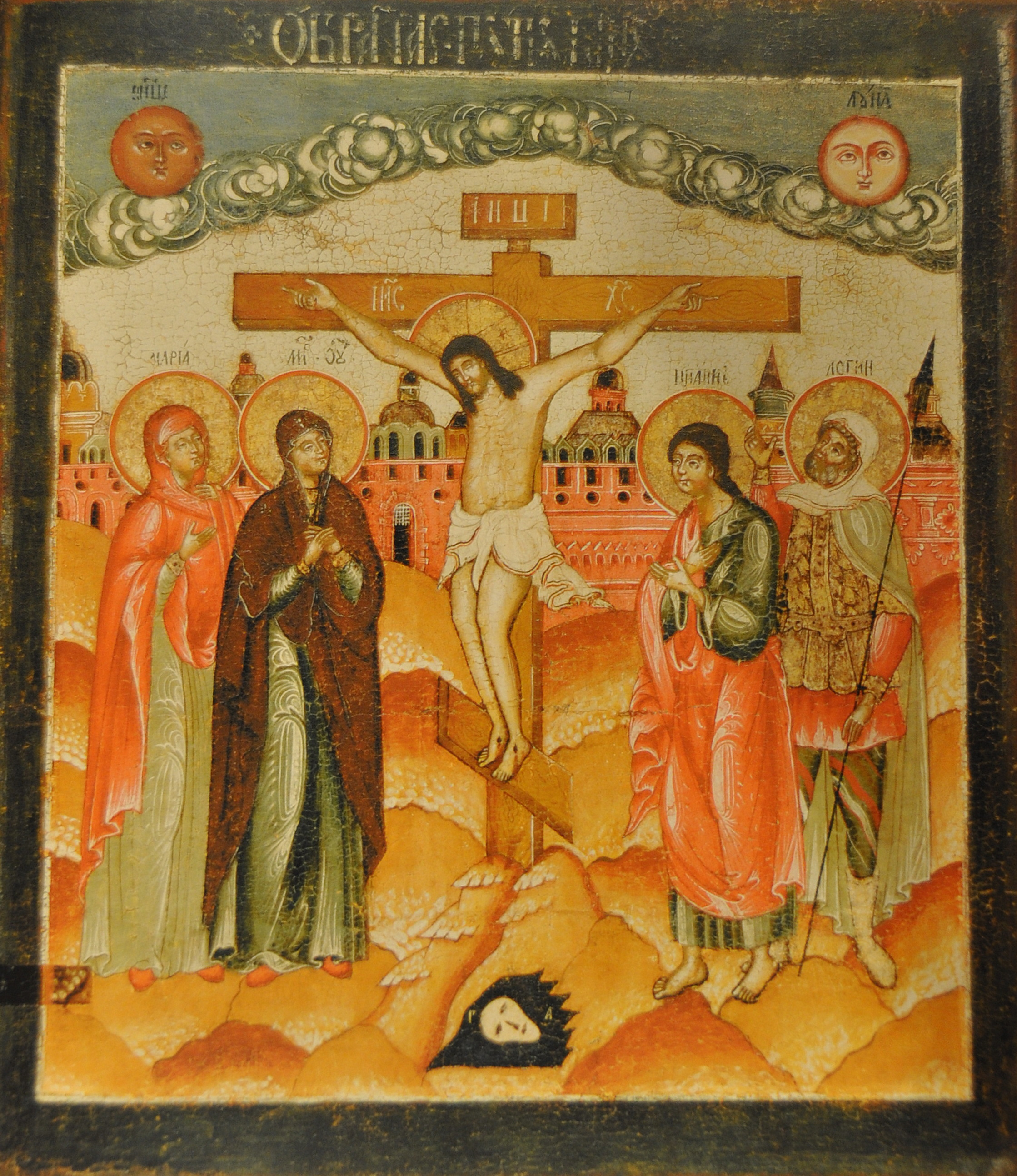 Икона Праздничного чина. Ц. Василия Блаженного (Чухчерьма). Первая треть XVIII века.